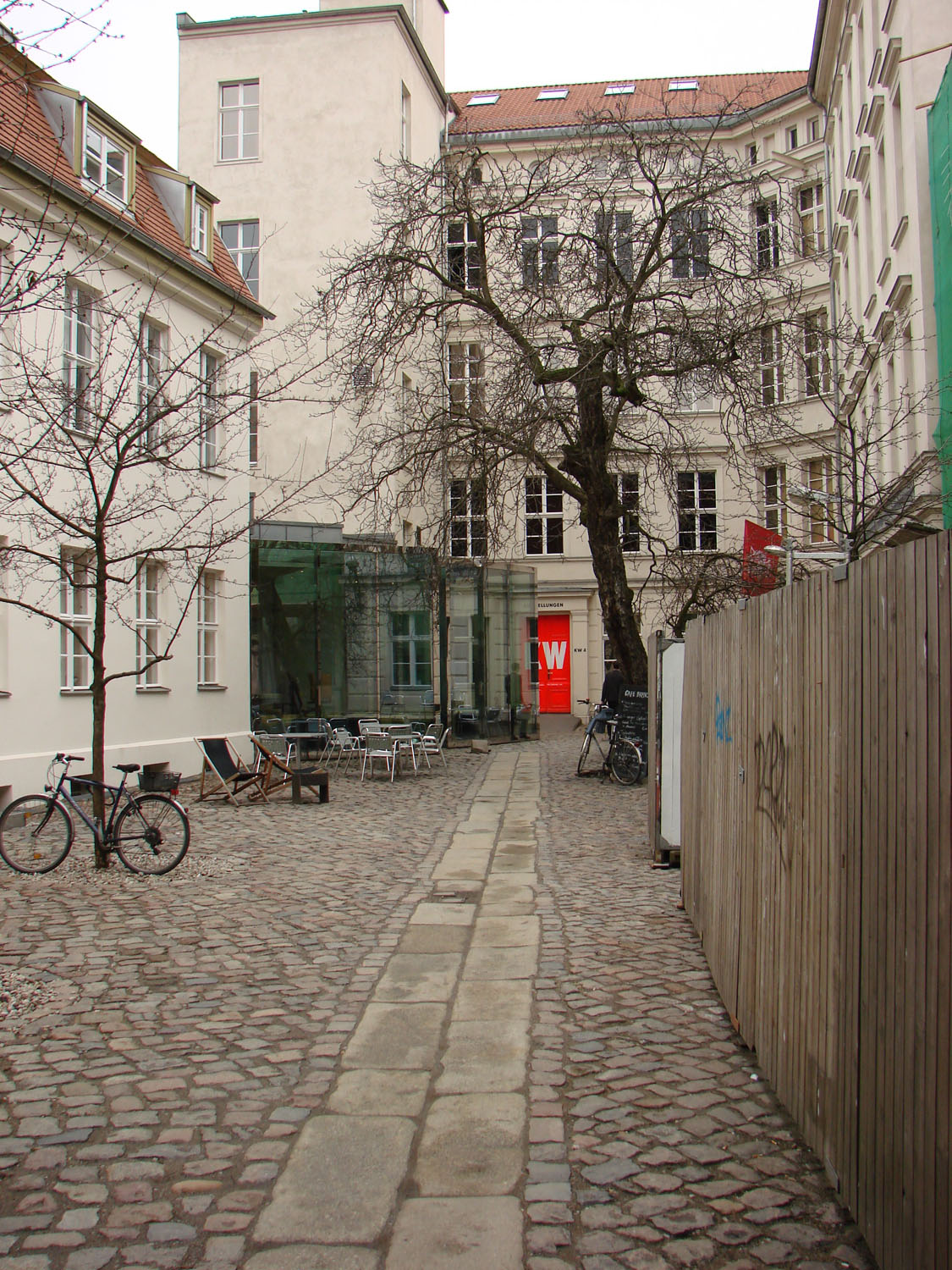 Kunst-Werke Berlin, Innenhof, fotografiert von der Auguststraße aus.